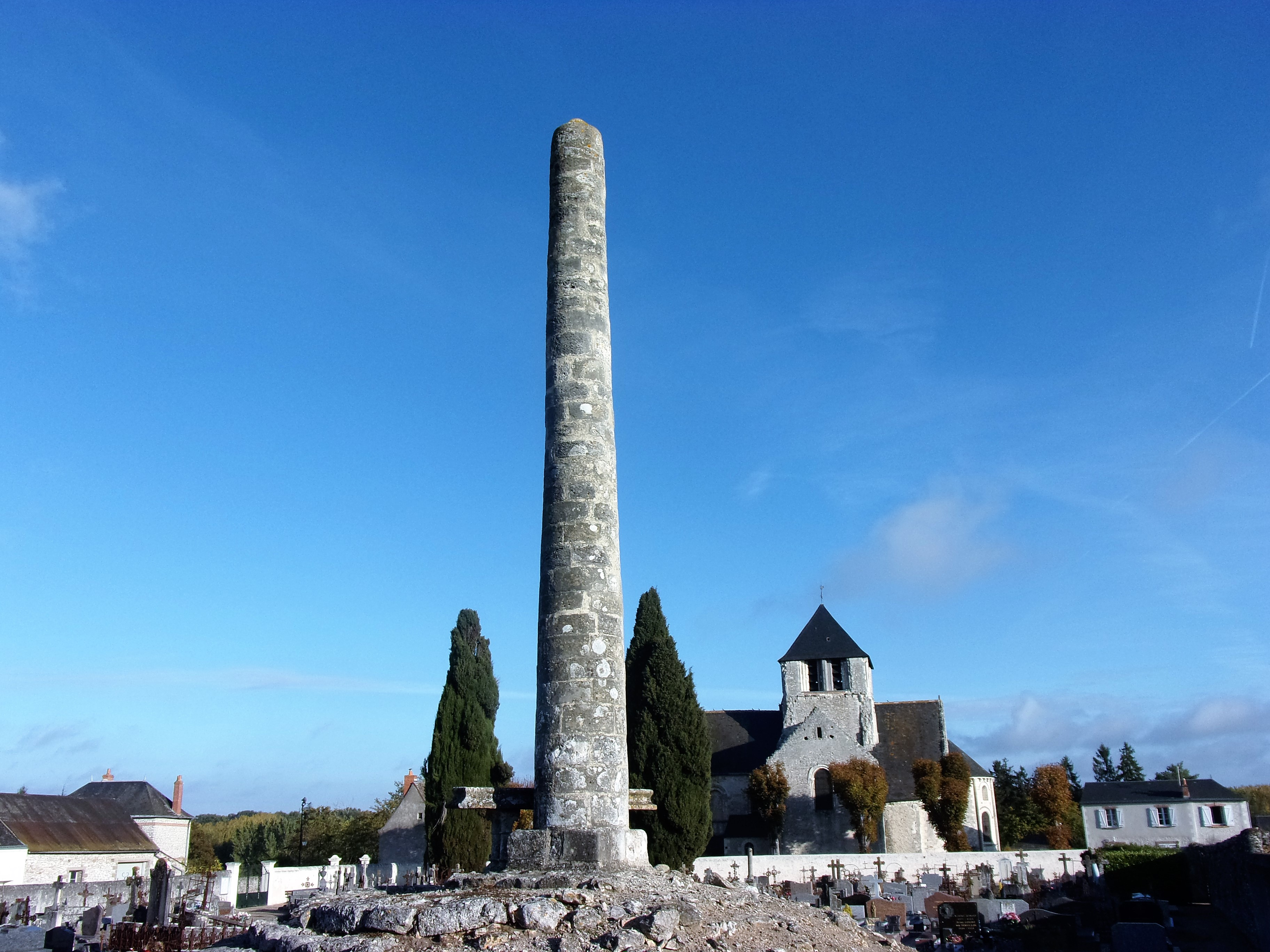 Vue de la lanterne des morts de Cormery dans le cimetière